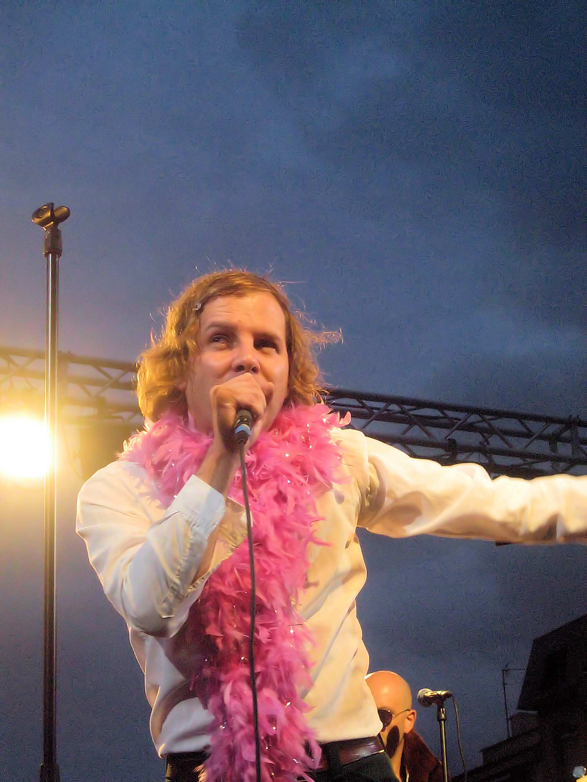 Le chanteur Philippe Katerine, en concert. Fête de la Musique - 21 juin 2006 Les Sables d'Olonne, Vendée, France.